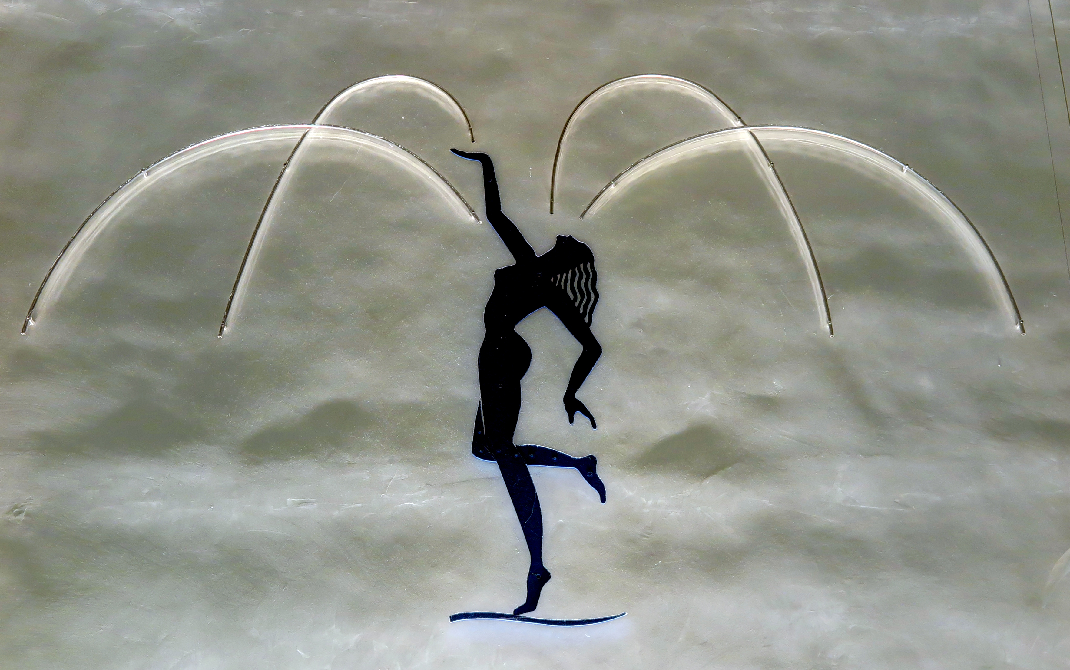 Deutschland, Bayern, Oberpfalz, Neualbenreuth, Thermalbad "Sibyllenbad", Wandbildnis der Sibylle im der Haupthalle des Bades